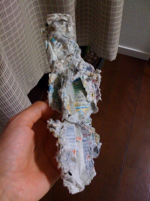 出発当日、洗濯機の中から、地球の歩き方が、、orz.jpg